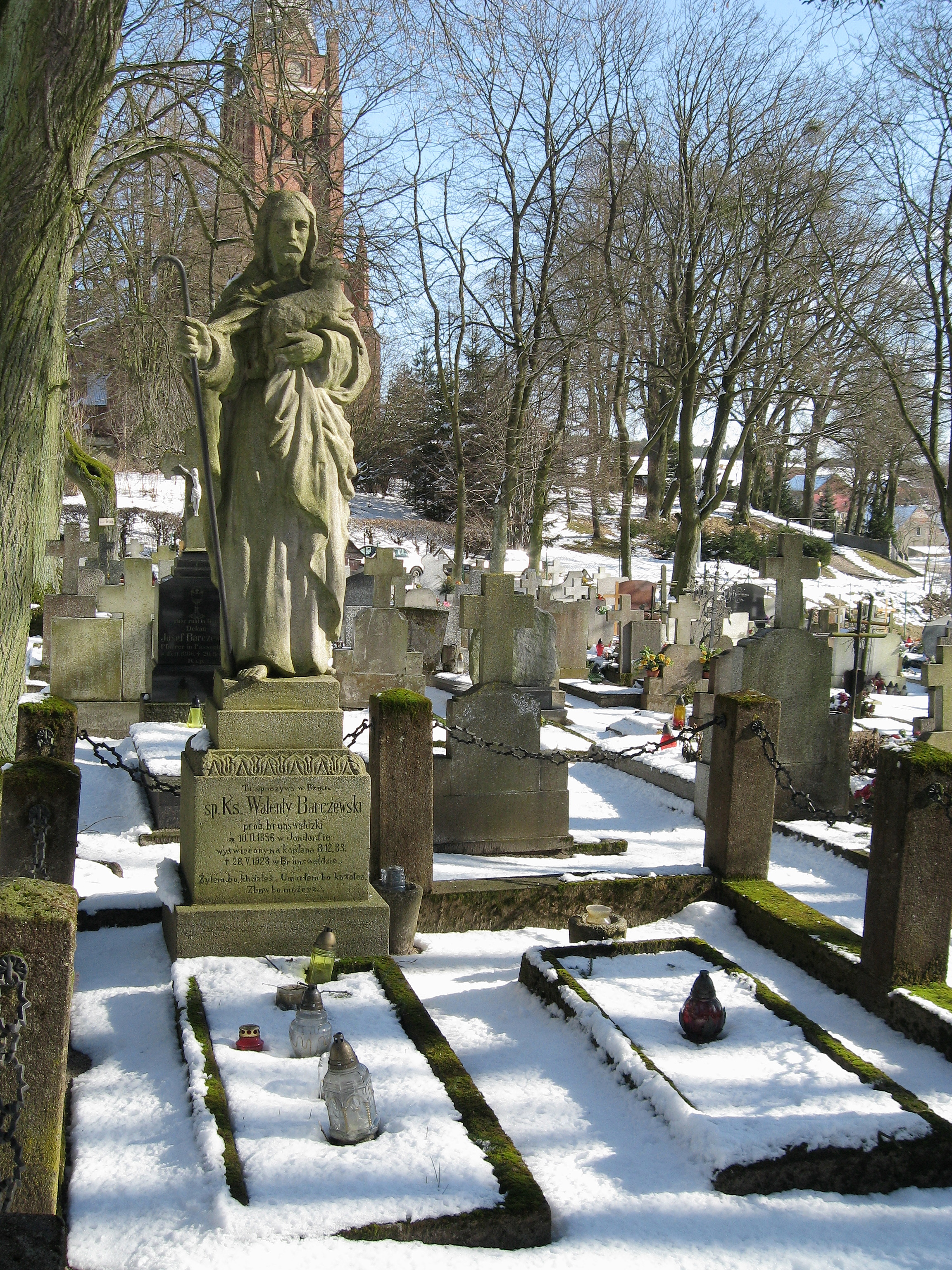 Pomnik nagrobny ks. Walentego Barczewskiego na cmentarzu w Brąswałdzie.